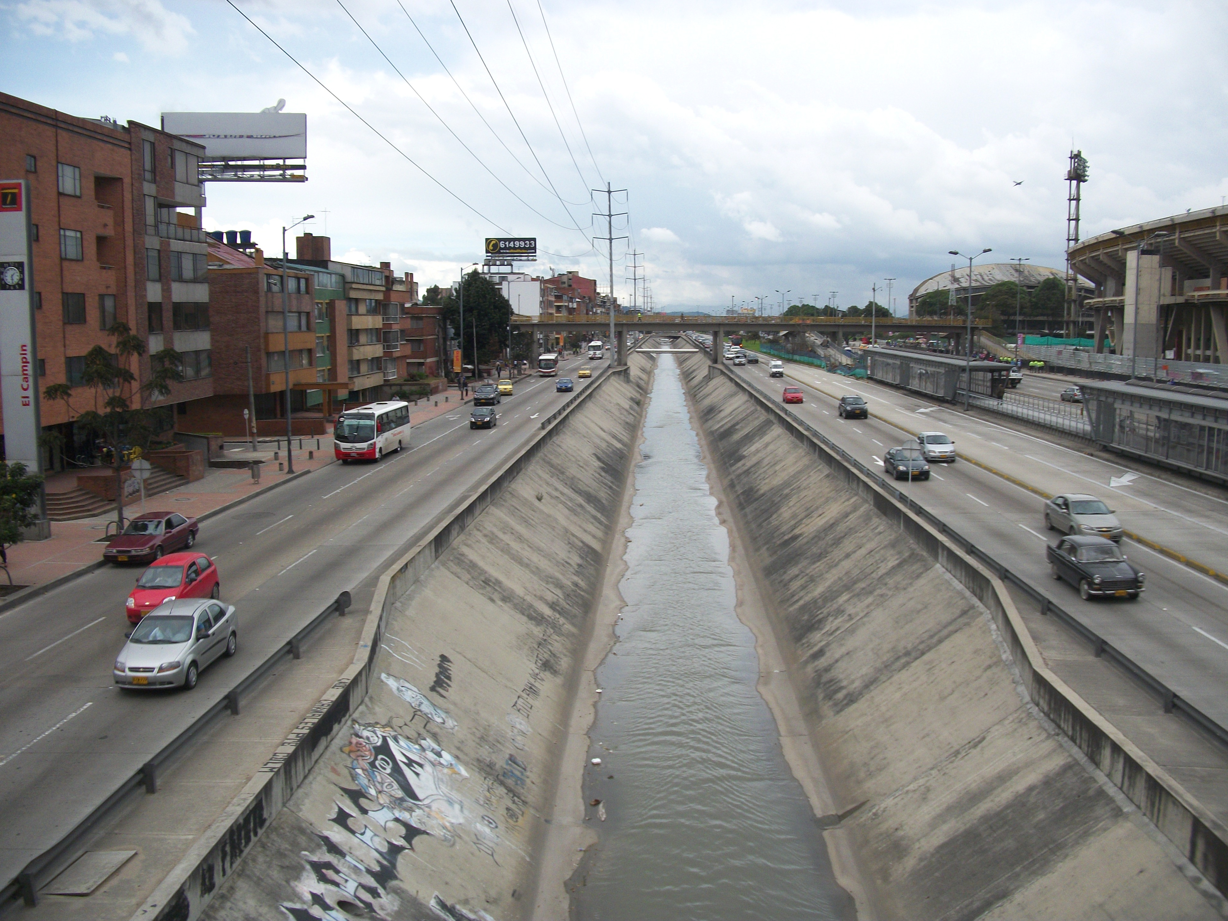 Avenidad Norte-Quito-Sur a la altura del estadio y de la estación de TransMilenio El Campín.